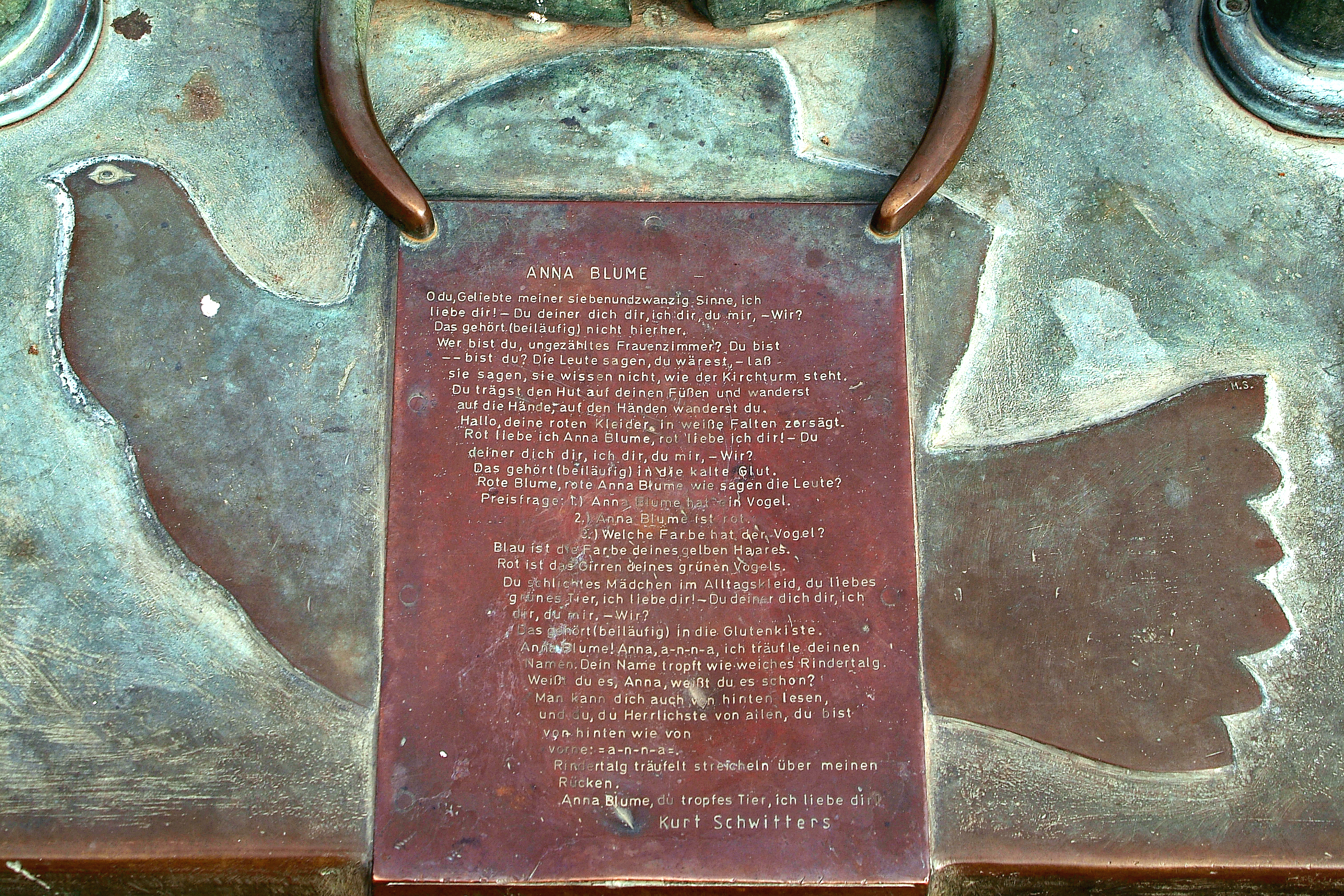 Das vollständige Gedicht "An Anna Blume", ein Merz-Gedicht von Kurt Schwitters von 1919; hier als Teil des Anna-Blume-Brunnens von Max Sauk von 1986, auf dem Mühlenberger Markt in Hannover Mühlenberg ...